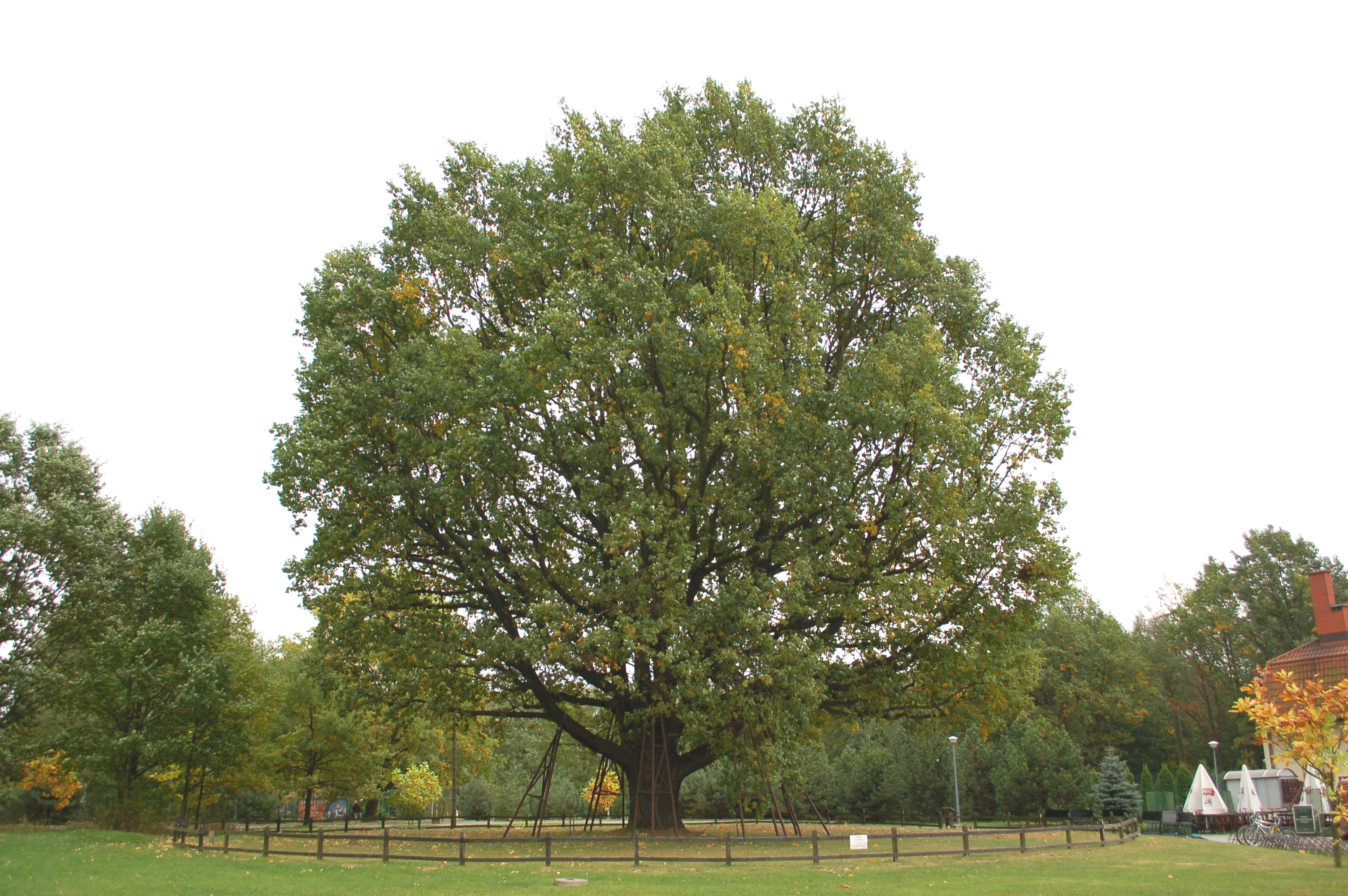 Powsin Park Warsaw